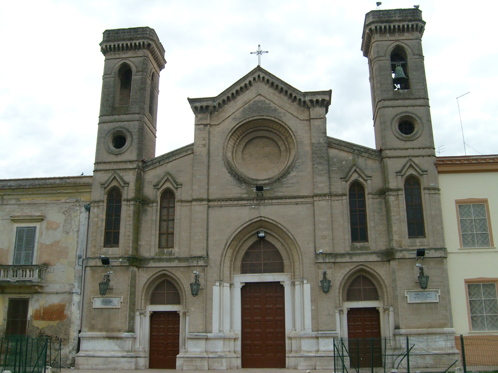 Facciata della Chiesa di San Domenico di Cerignola (FG).